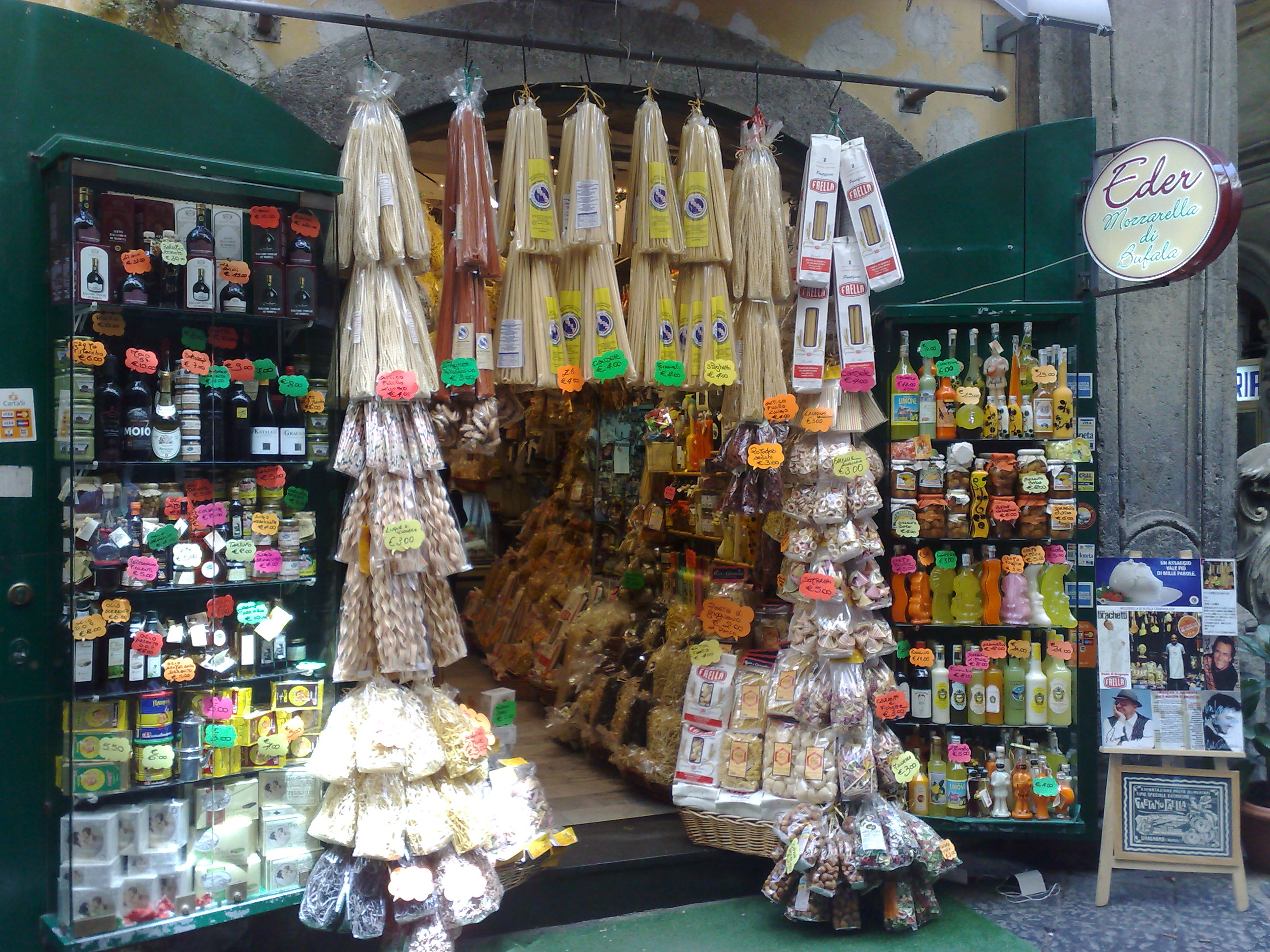 Napoli, un negozio di prodotti tipici napoletani e campani.